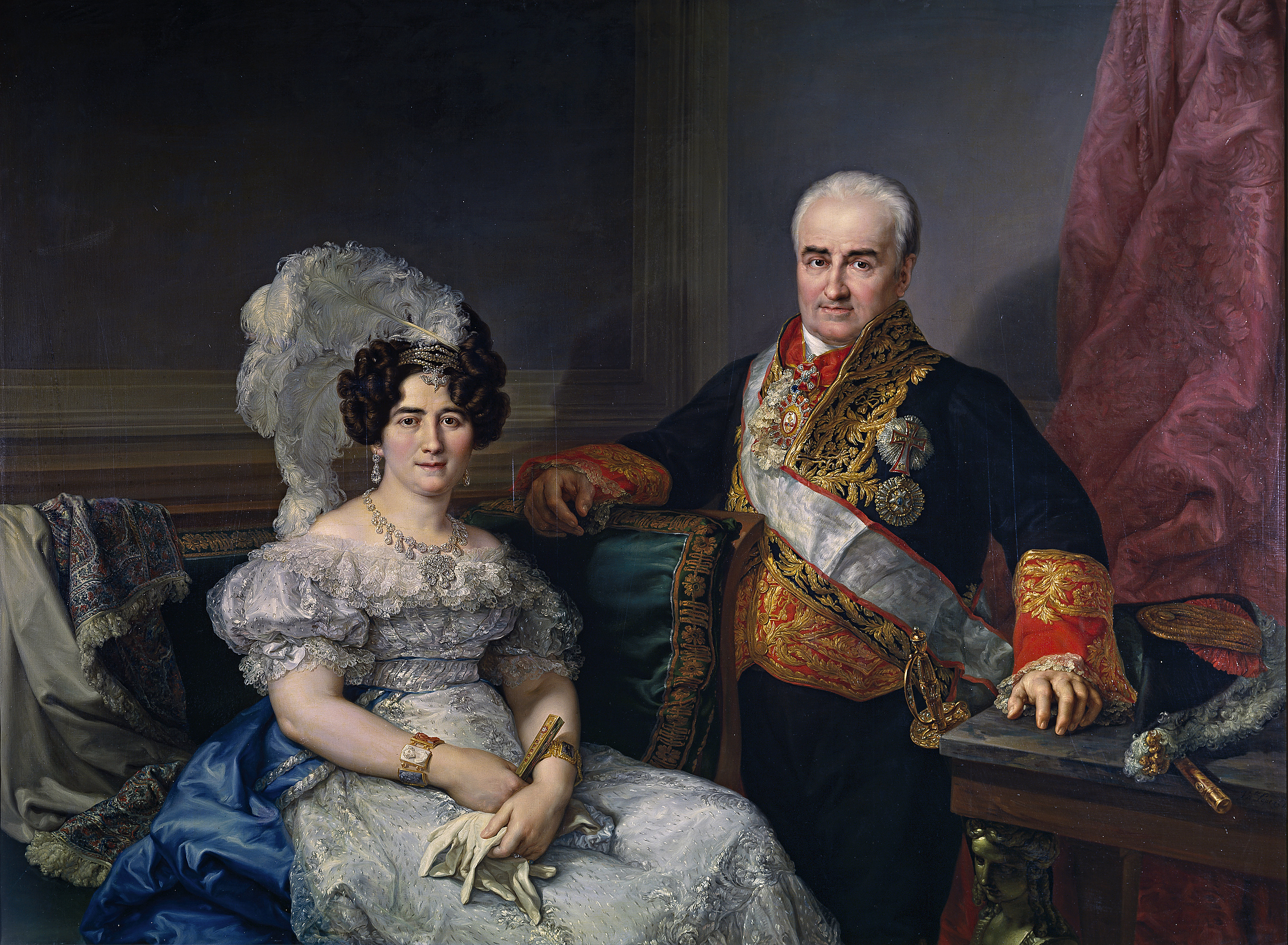 Retrato del político español Antonio Ugarte (1780-1833) y de su esposa, María Antonia Larrazábal. Antonio Ugarte y Larrazábal fue uno de los personajes más influyentes de la camarilla de Fernando VII.